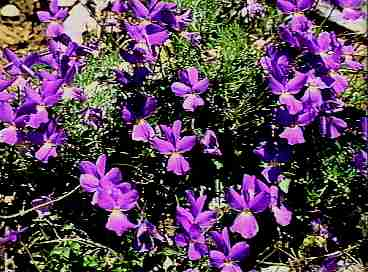 Sicilian botanical endemisms Viola nebrodensis